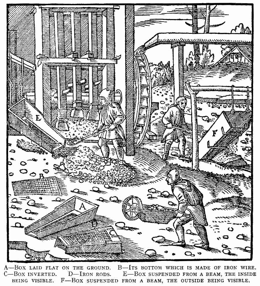 Georgius Agricola, De re metallica 1556